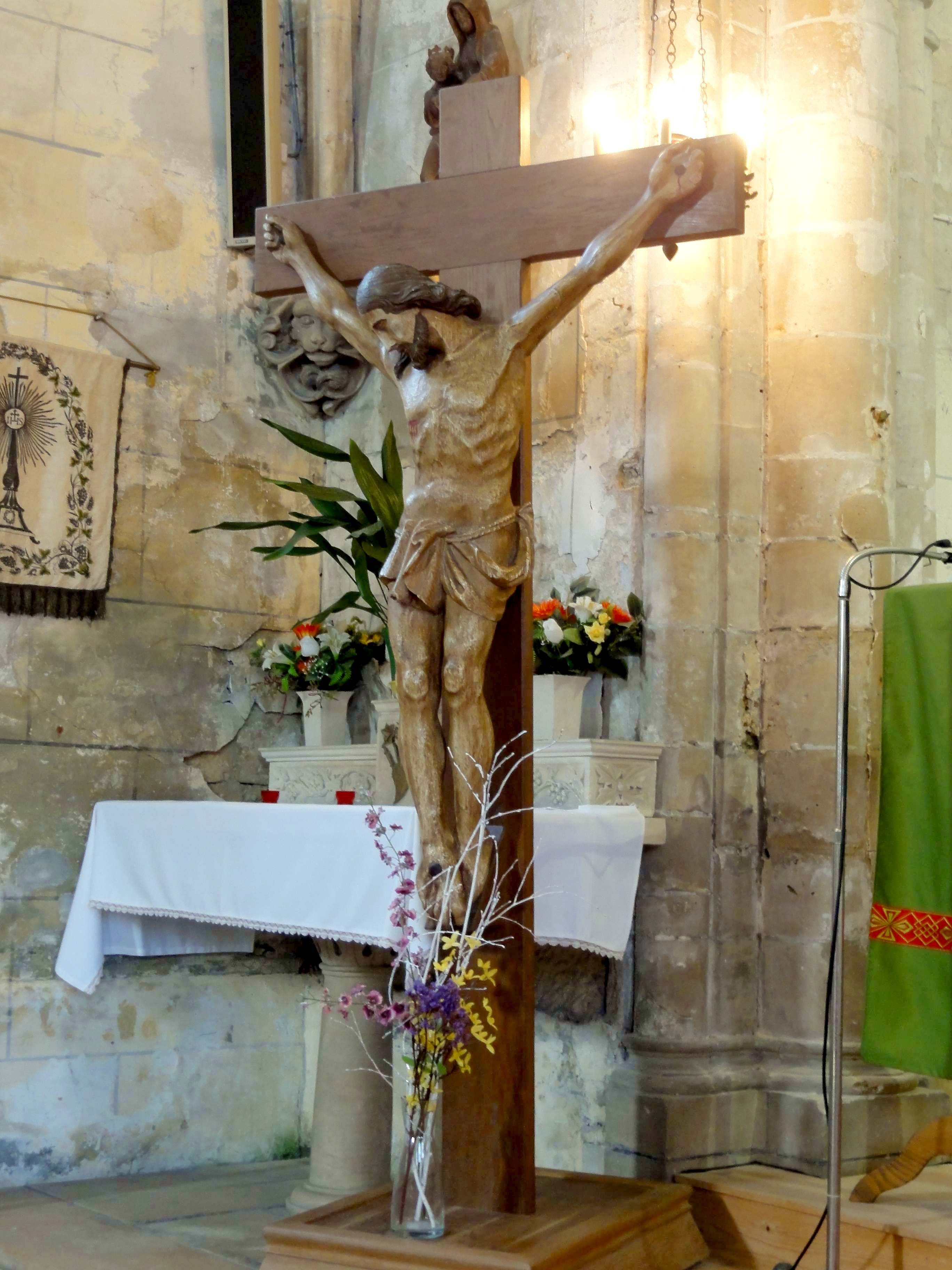 Christ en croix.